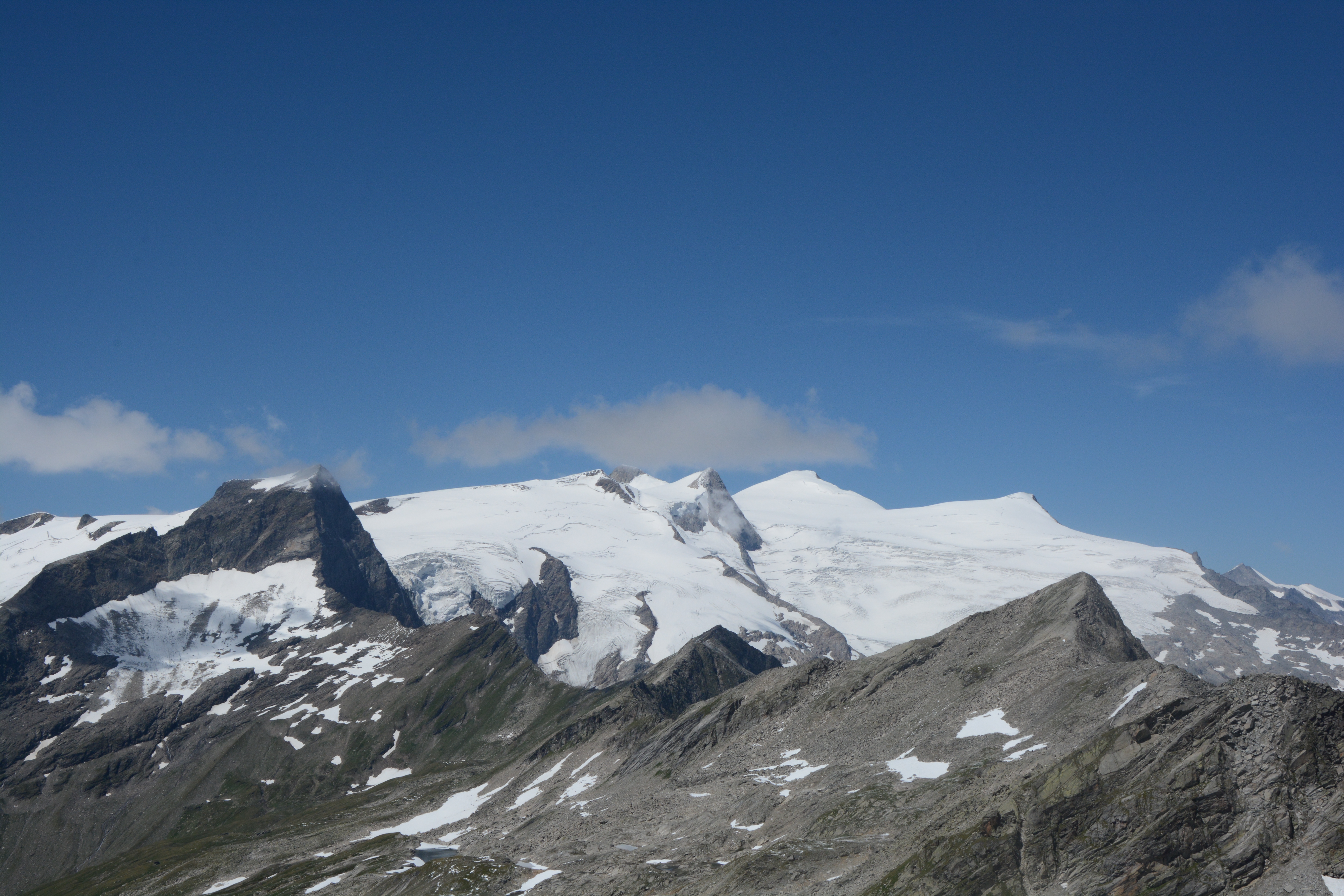 Die Venedigergruppe zwischen Kristallwand und Keeskogel. Im Vordergrund Löbbenkopf sowie Innerer und Äußerer Knorrkogel gesehen von der Wildenkogelscharte.